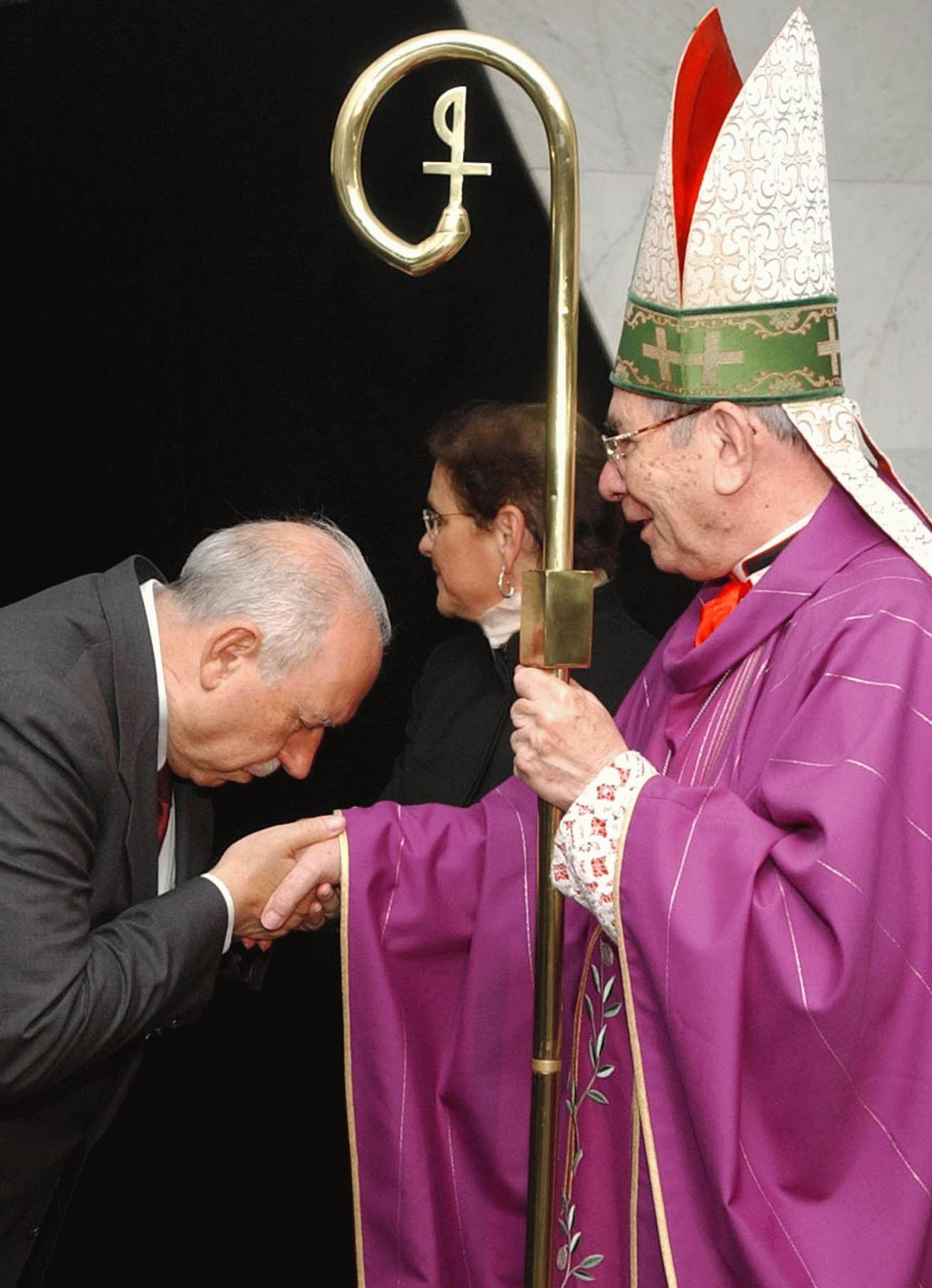 O vice-presidente do Brasil, José Alencar, beija a mão do arcebispo de Brasília, Dom Cardel Freire Falcão.